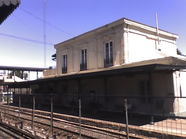 Estación Moreno, provincia de Buenos Aires, Argentina.